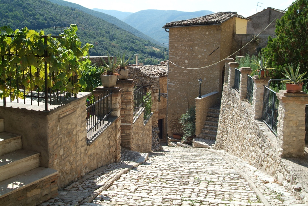 Scorcio di Casperia, via Orazio Massari